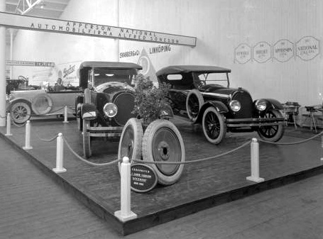 Jubileumsutställningen 1923. Firmautställning: Automobilfirma Alfred Soneson.